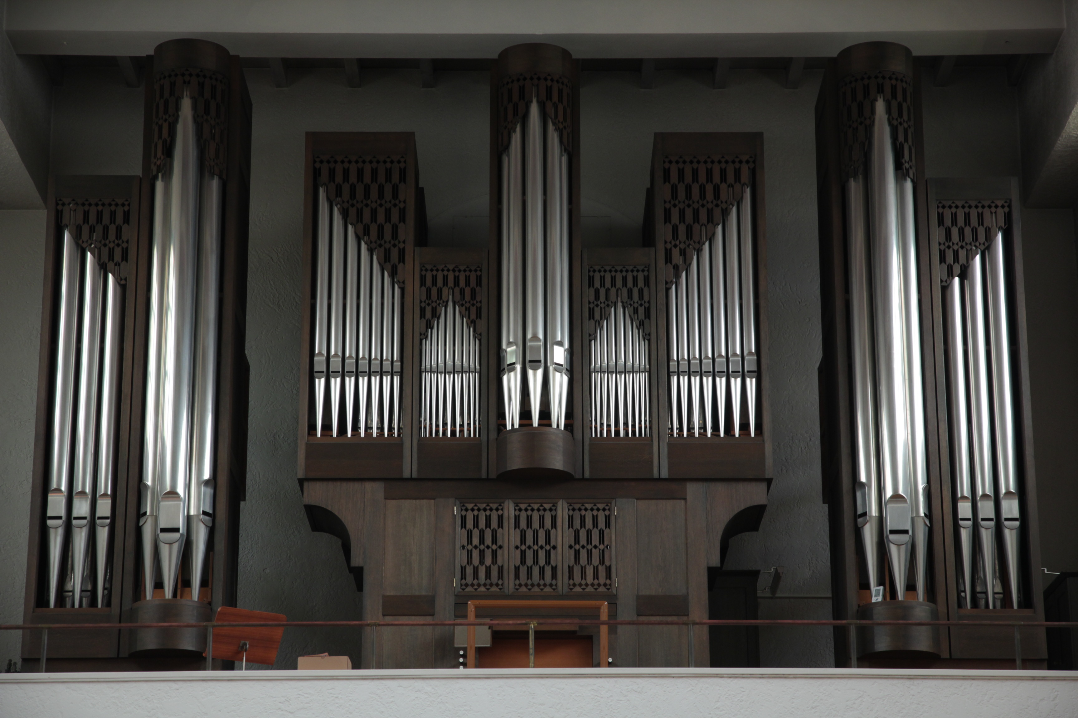 Römisch-katholische Kirche Bruder Klaus Zürich, Orgel